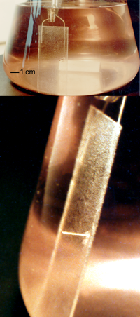 Bifofilm von Nitrosolobus spec.[1]